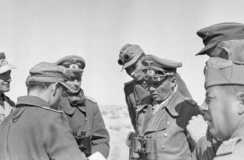 [Bildbegleitzettel:] General [Erwin] Rommel und General Cruewell in der Wüste bei einer Panzerdivision (Flankenstellung bei El Agheila); Film-Nr. 101/3, 17B [Scherl-Text:] Prop.-Kp. Lw.7, Text: 17B/15AK Bildberichter Zwilling Nordafrika [aufgenommen am] 12.1.42 Generaloberst [Erwin] Rommel bei der italienischen Division "Pavia" in der nordafrikanischen Wüste. Ganz vorne rechts einer der Generäle der Division. Information added by Wikimedia users.Il generale tedesco Erwin Rommel a colloquio con uno dei generali della divisione italiana "Pavia" nel deserto nordafricano, a Bei El Agheila. 12 gennaio 1942. Foto di propaganda nazista scattata da Ernst Zwilling.